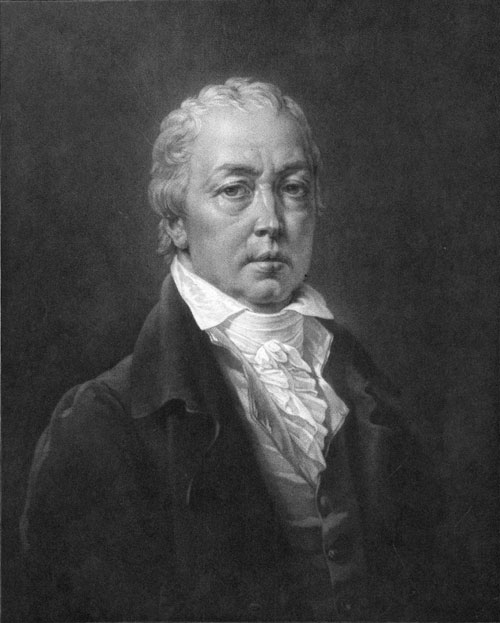 Bildnis des Malers Heinrich Friedrich Füger (Schabkunstblatt nach einem gemalten Selbstbildnis Fügers. 35,8 x 26,8 cm. Um 1818)